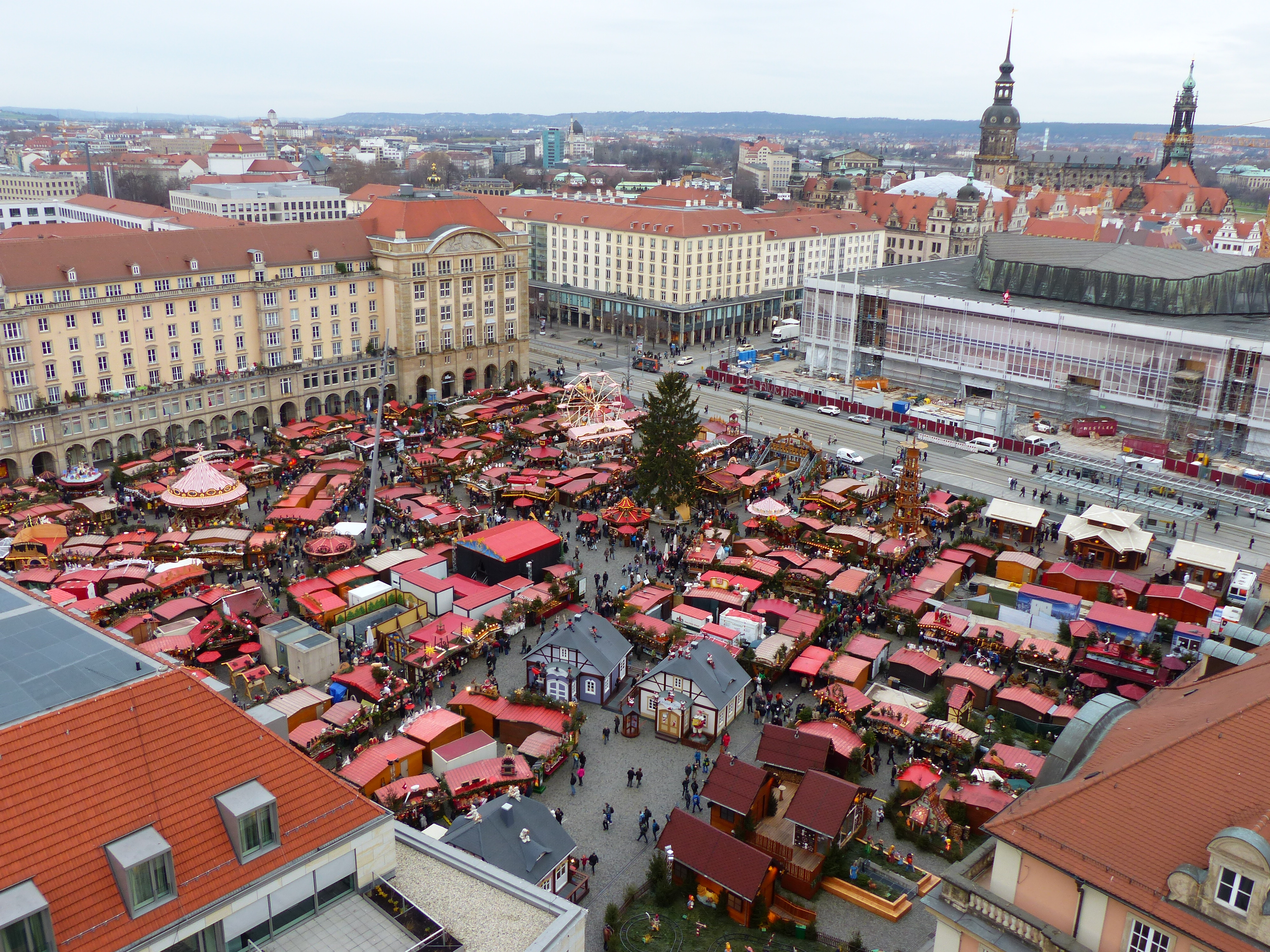 Blick auf den Striezelmarkt vom Turm der Dresdner Kreuzkirche aus